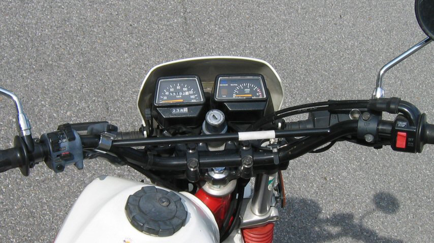 Yamaha XT350 Armaturen